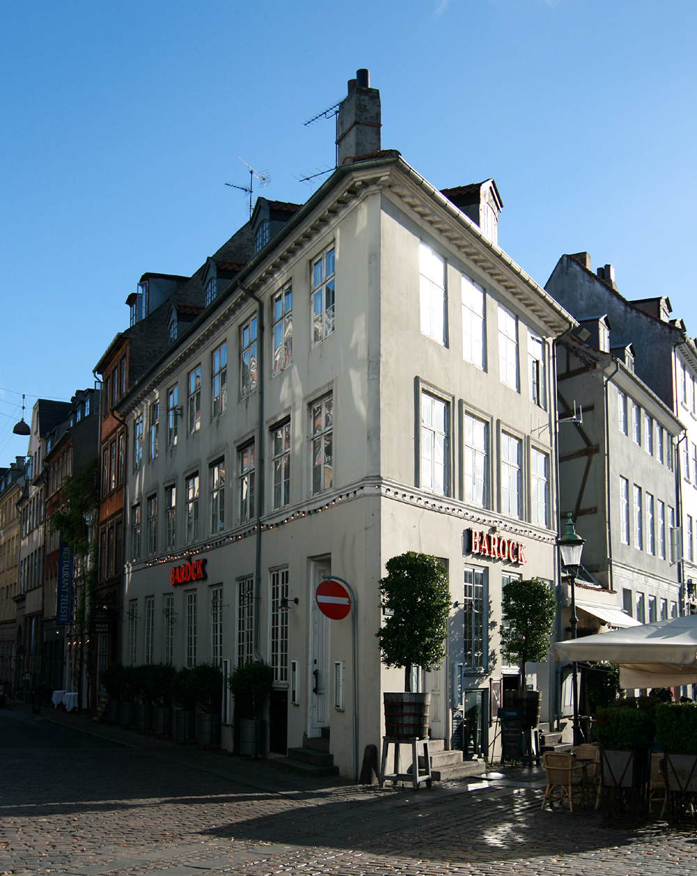 Restaurant Barock, Nyhavn 1, København. Built 1753, listed.